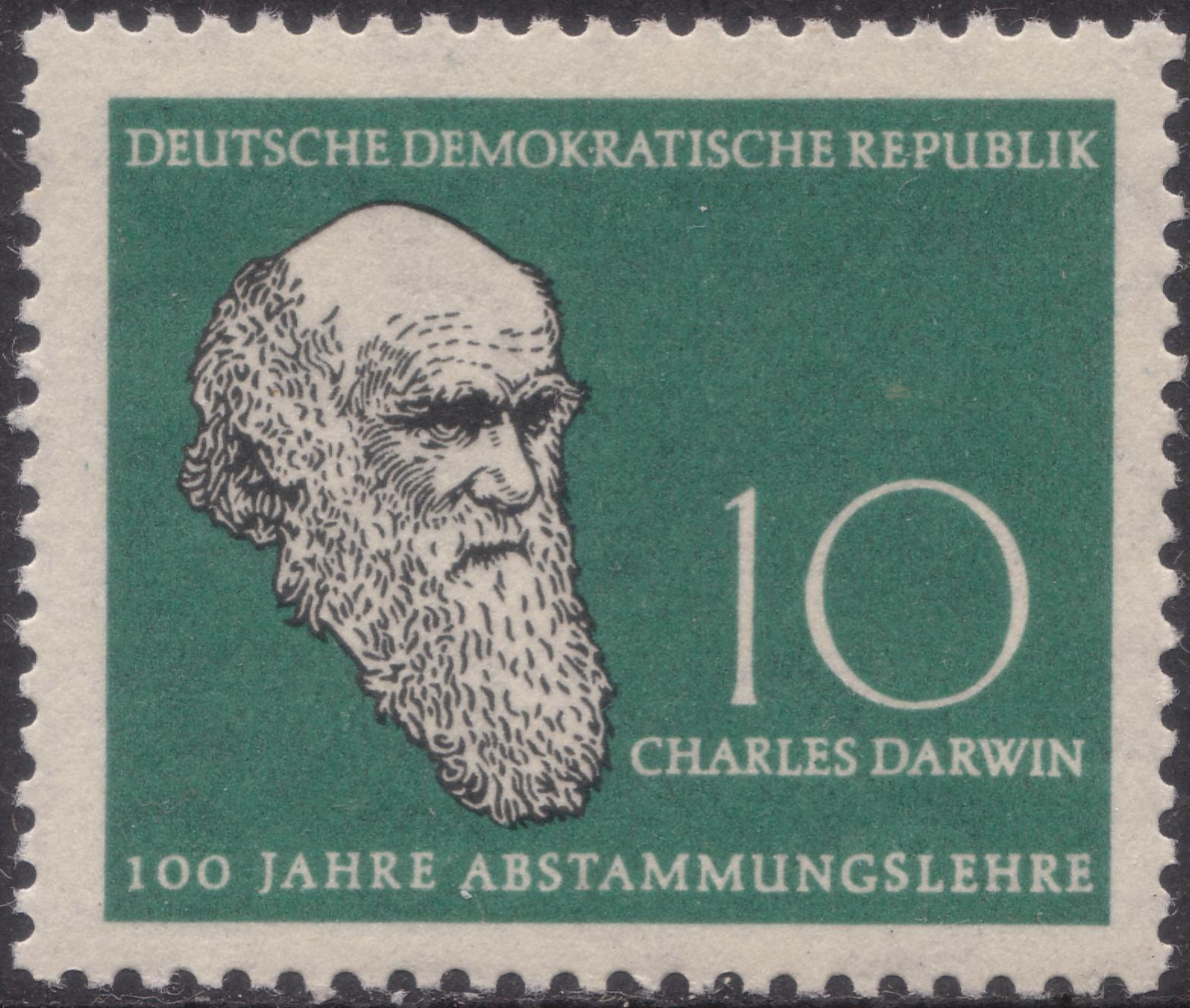 Stamp description / Briefmarkenbeschreibung